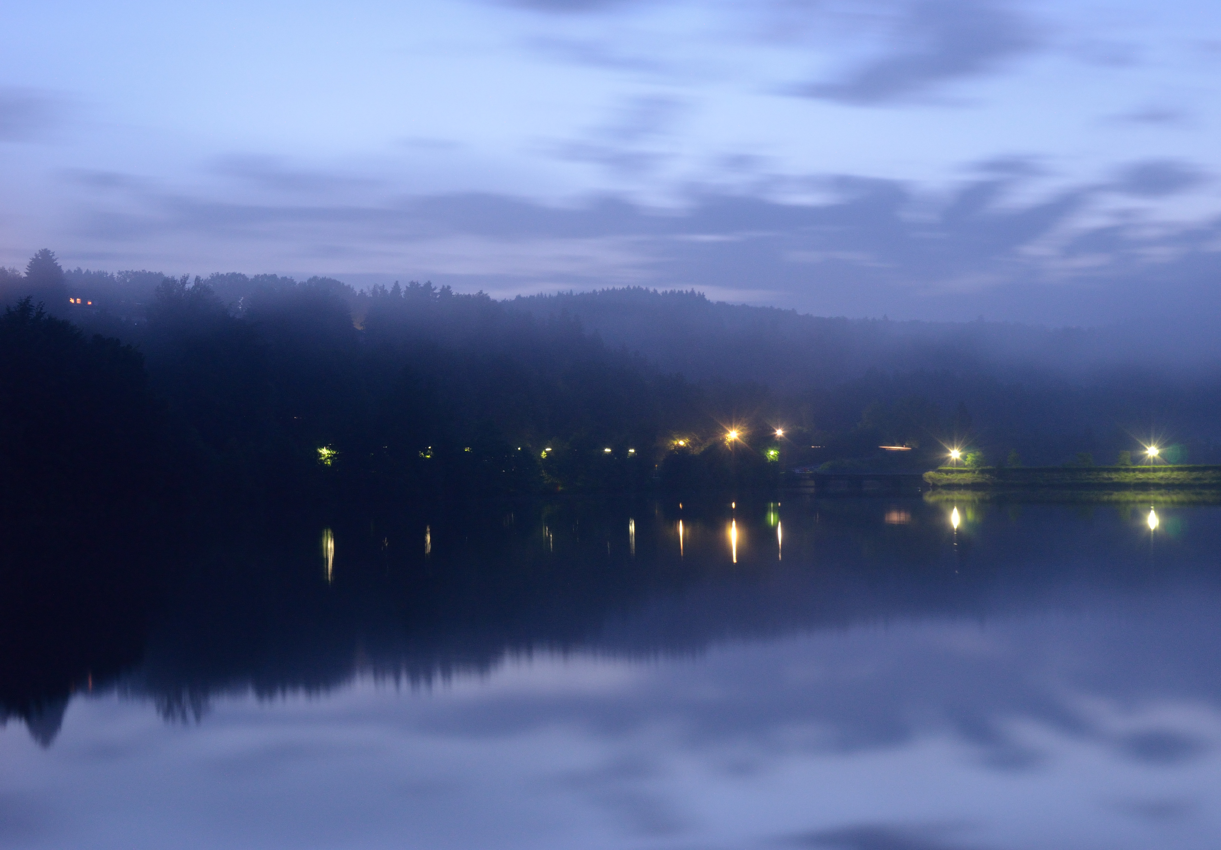 Biggesee at night